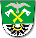 Kuřimské Jestřabí znak